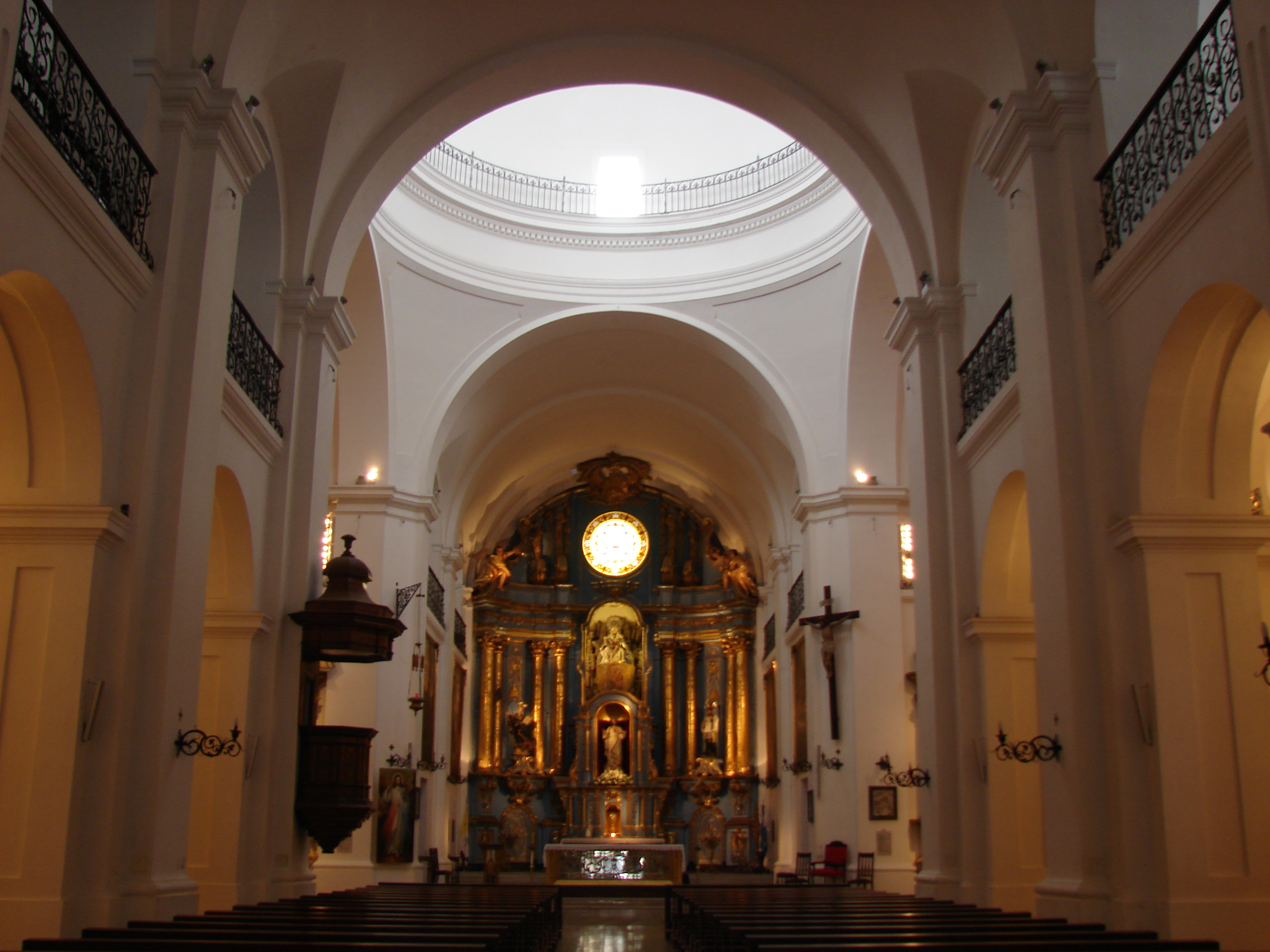 Iglesia de San Ignacio de Buenos Aires. Imágen tomada desde la nave mirando hacia el altar. La nave y cúpula sobrias contrastan con la decoración en dorado y turquesa del sagrario